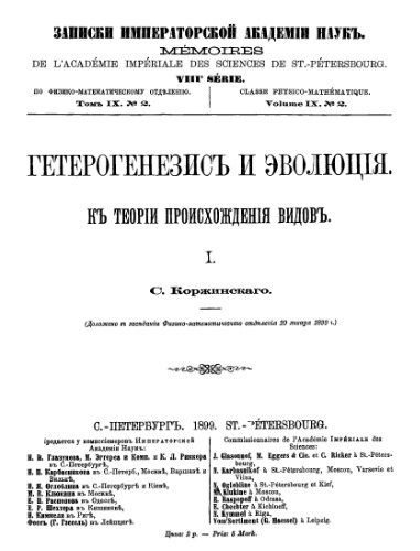 Труд "Гетерогенезис и эволюция"